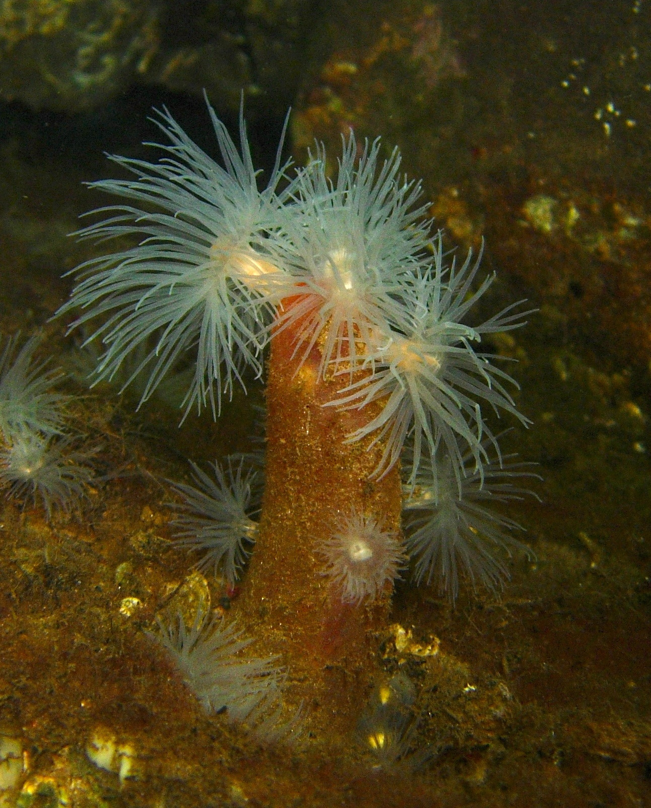 Protanthea simplex en Dogfish Reef, Furnace, Loch Fyne. Reino Unido